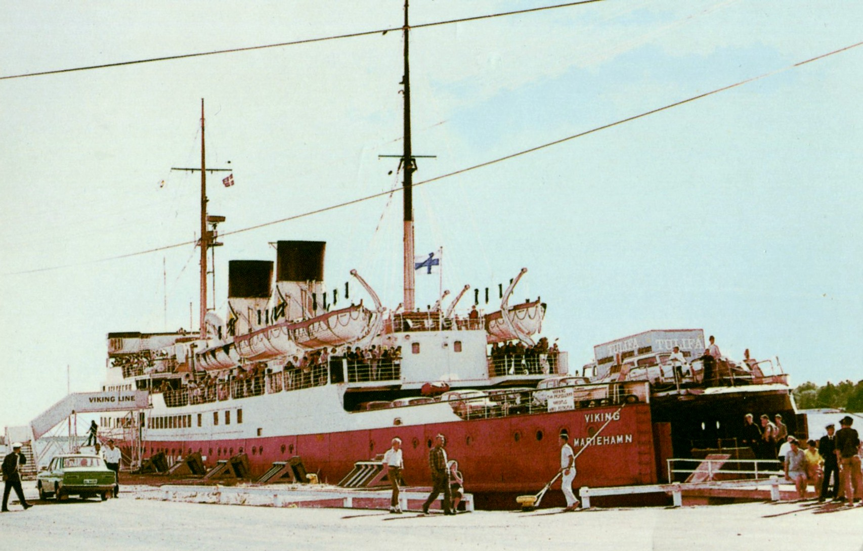 Viking Lines första fartyg S/S Viking